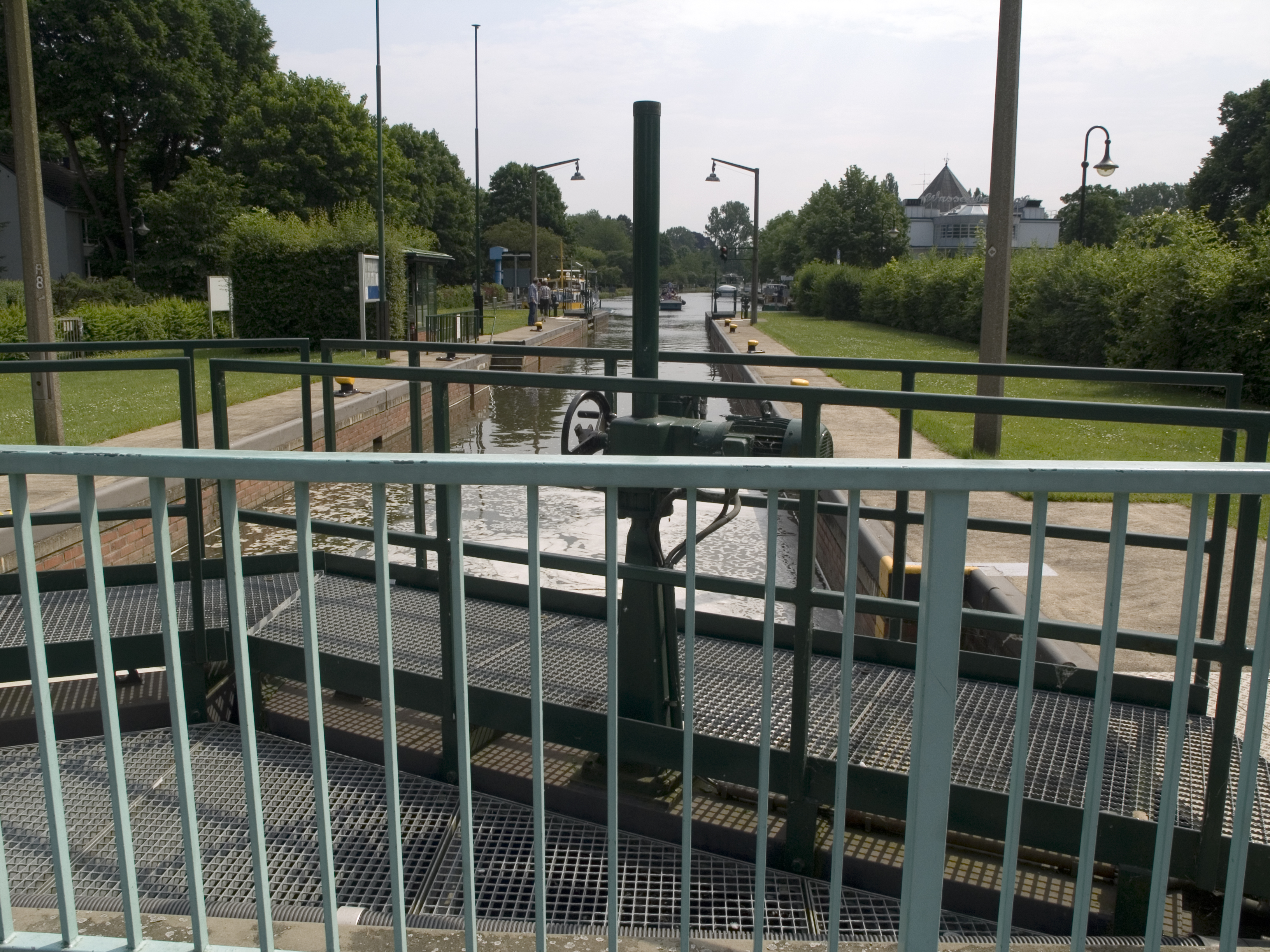 Северный Рейн-Вестфалия, Мюльхайм-на-Руре - Мюльхаймский шлюз